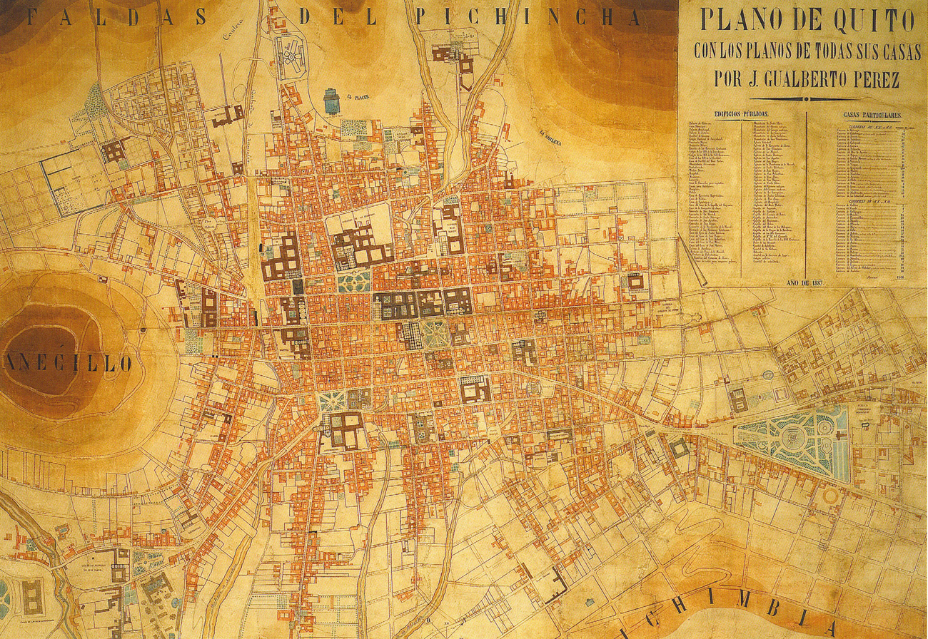 Mapa de Quito de 1887